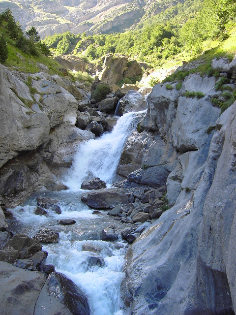 Aragonés: Salto d'augua en o río Cinca, en o corso alto, en a valle de Pineta, aman de a on que naixe.